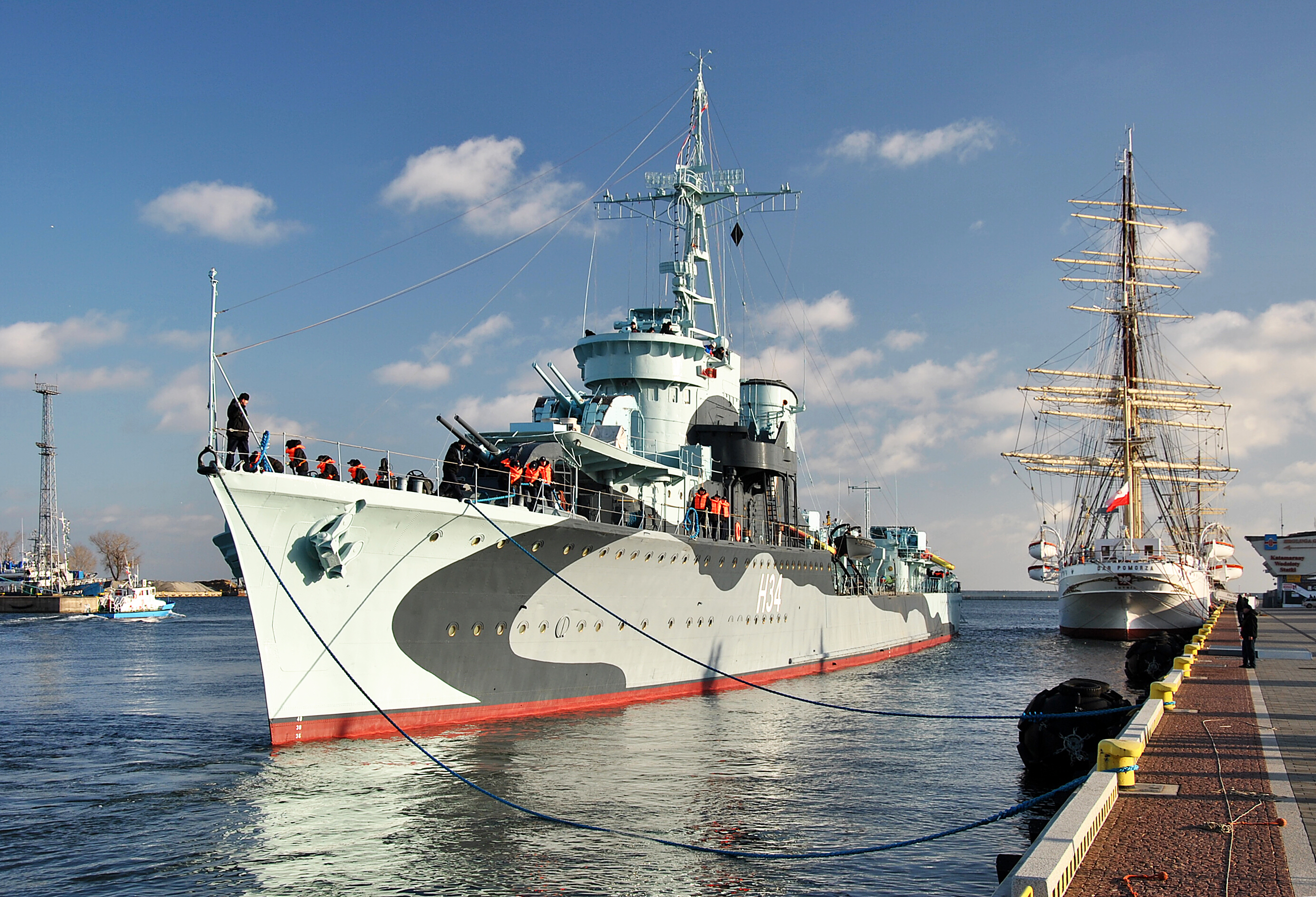 Błyskawica po trzymiesięcznym remoncie w stoczni Nauta podchodzi na swoje stałe miejsce w Basenie Prezydenta.